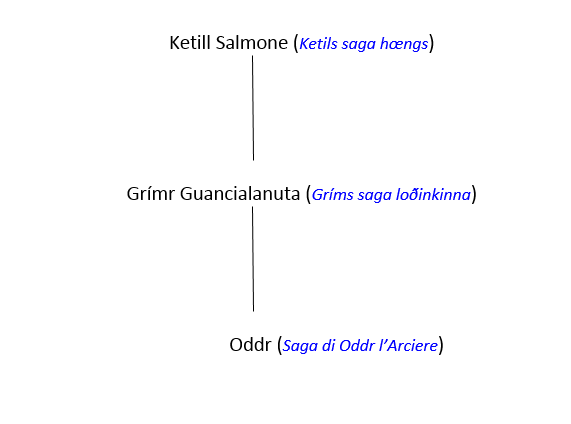 Albero genealogico di Ketill, Grim e Oddr